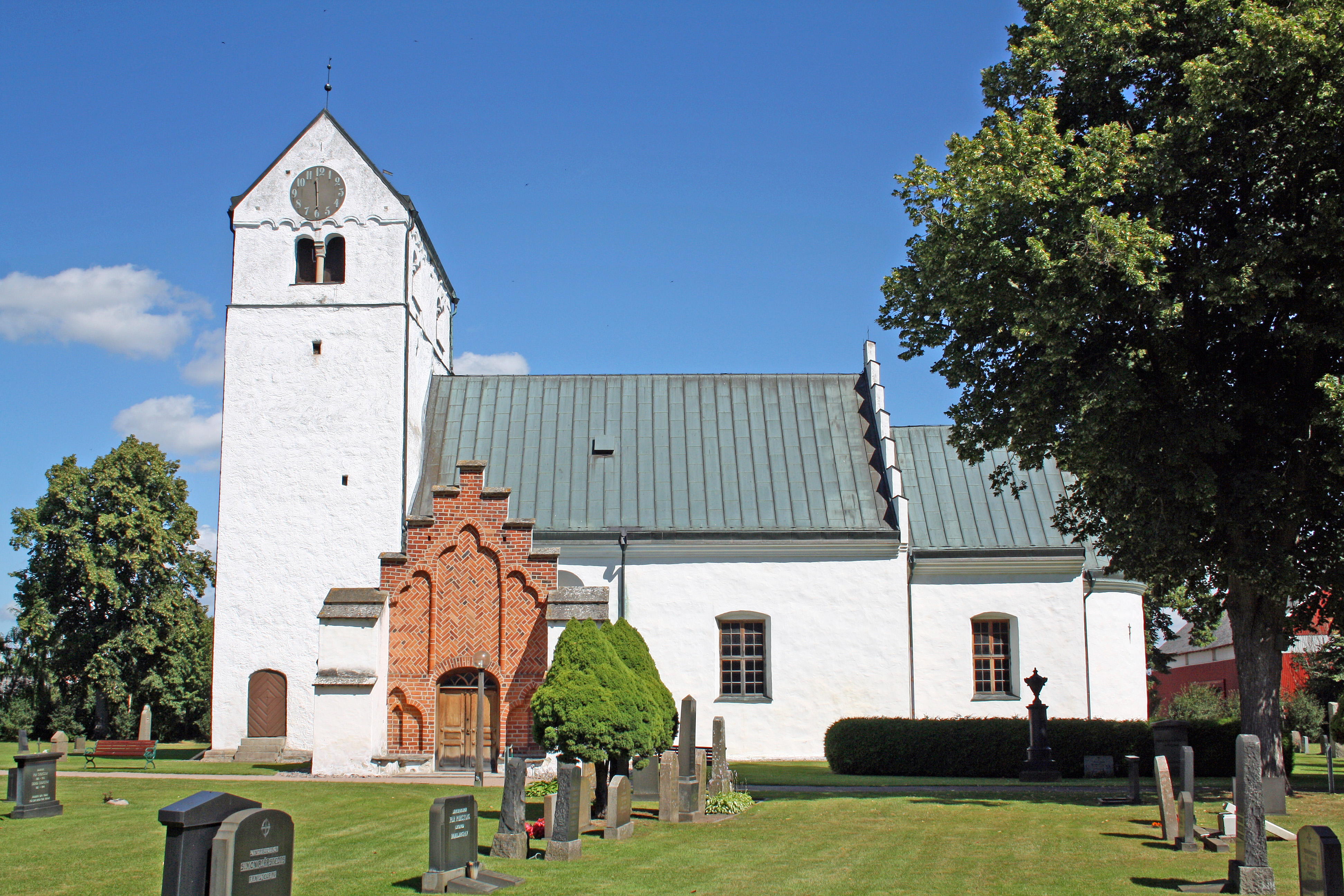 Fjälkinge kyrka, den 4 augusti 2012